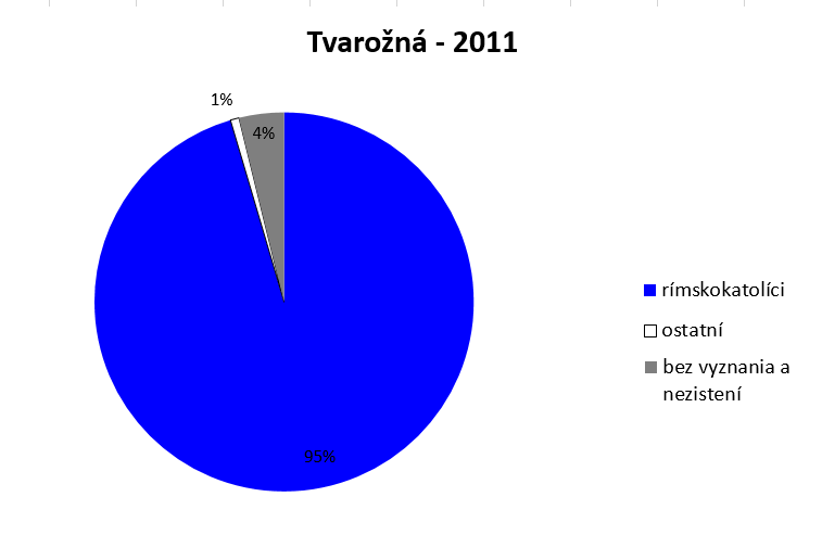 náboženské zloženie